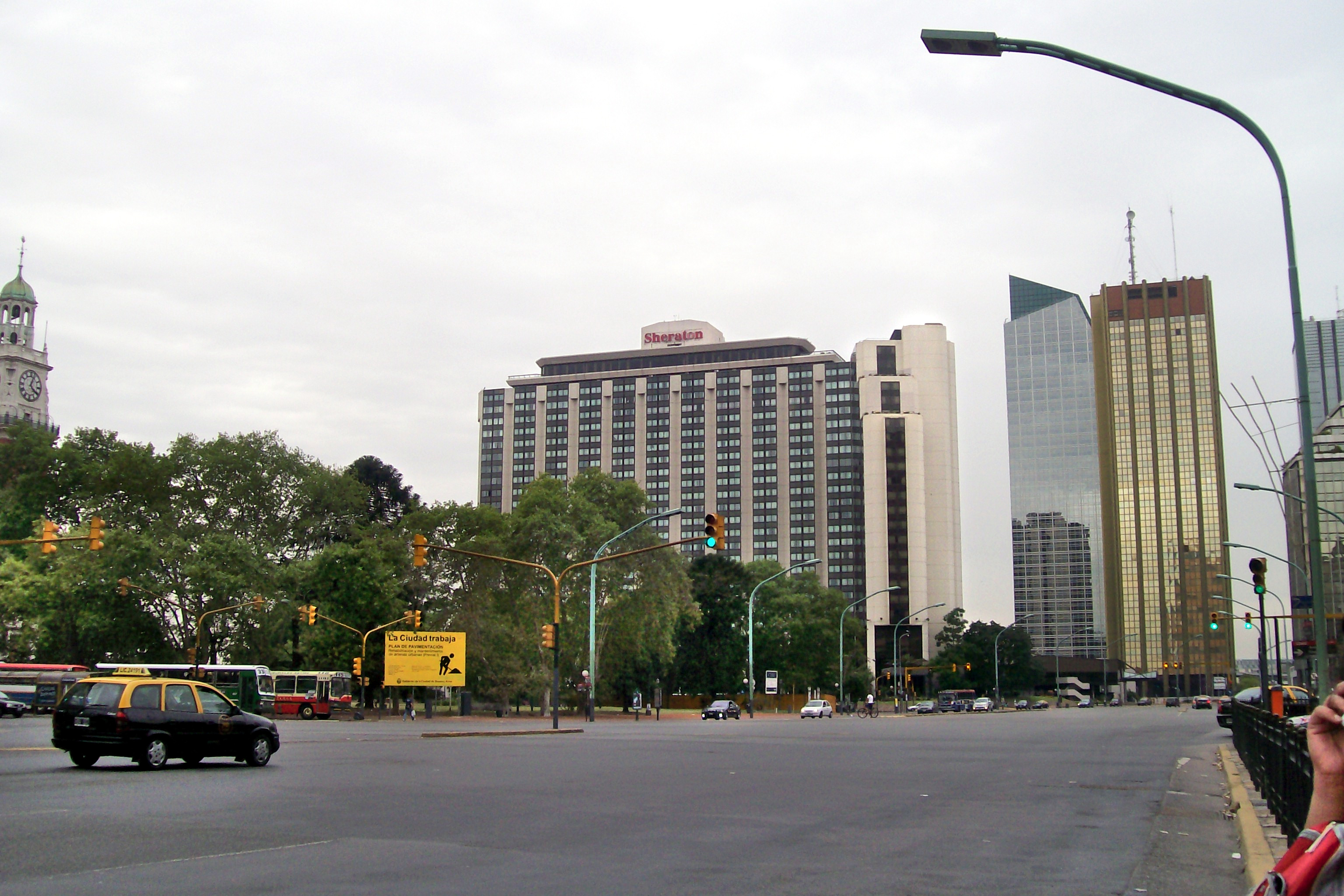 Hotel Sheraton del barrio de Retiro